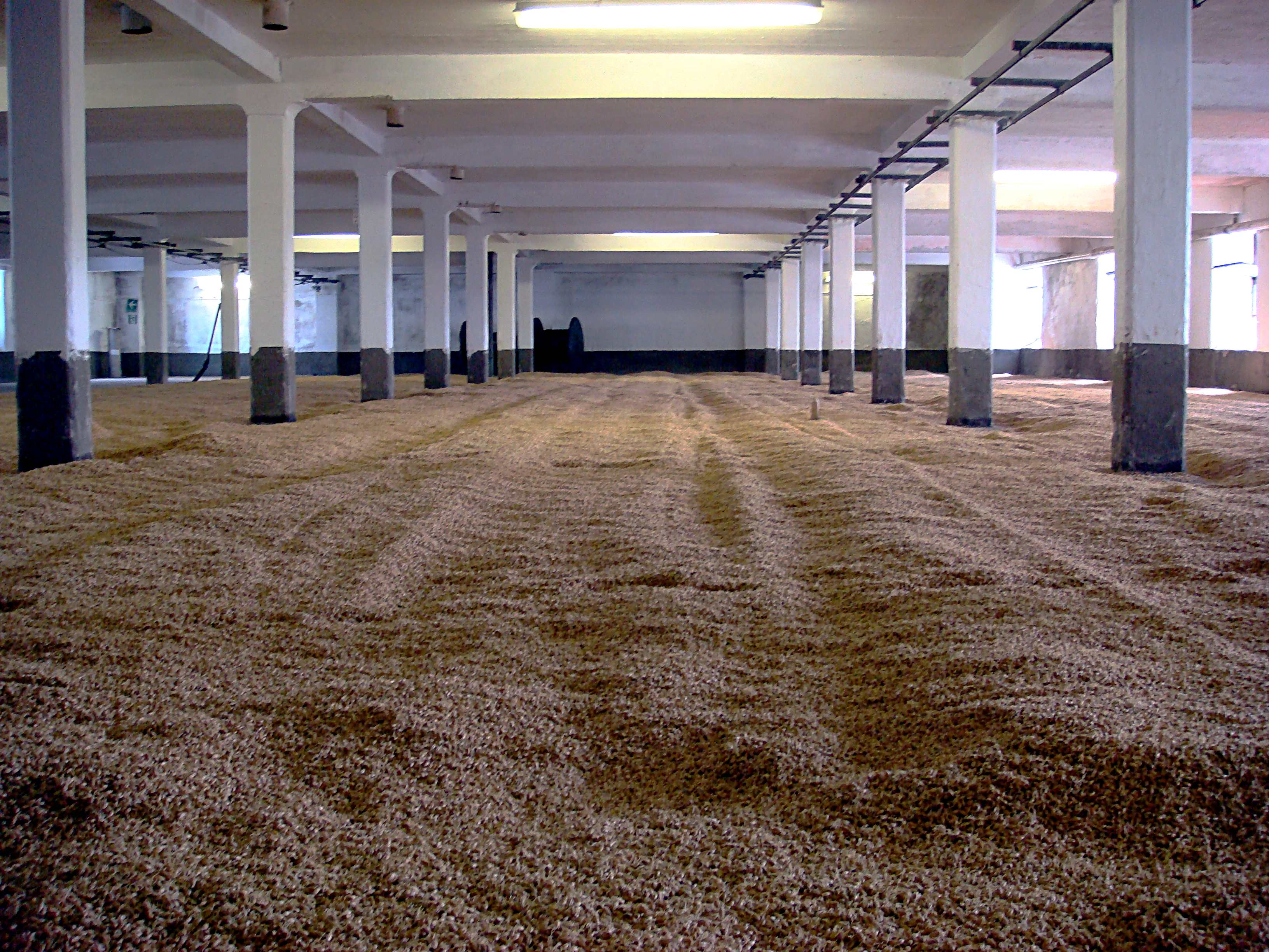 Malzboden zur Keimung der Gerste (Mälzen)